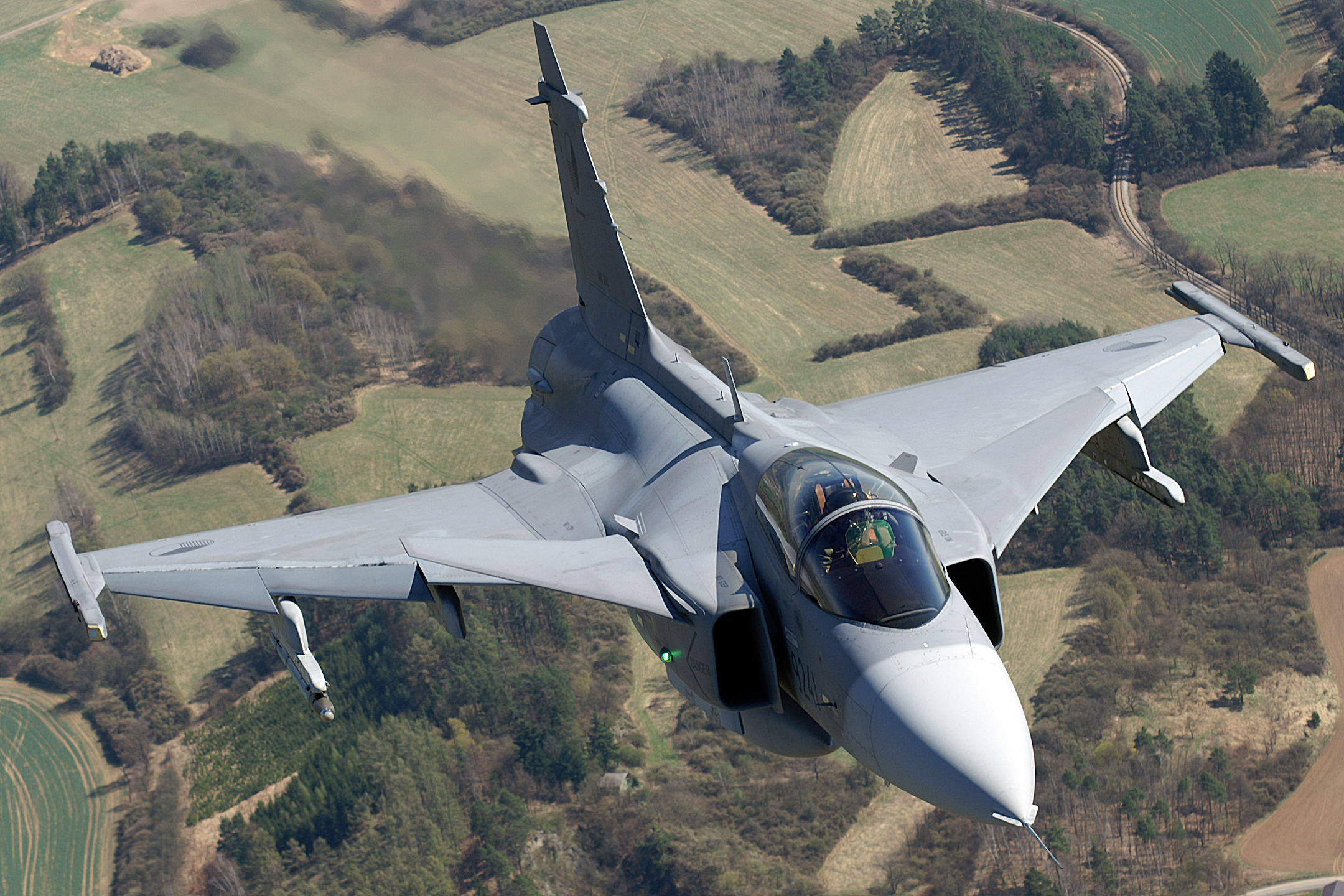 JAS39C Gripen